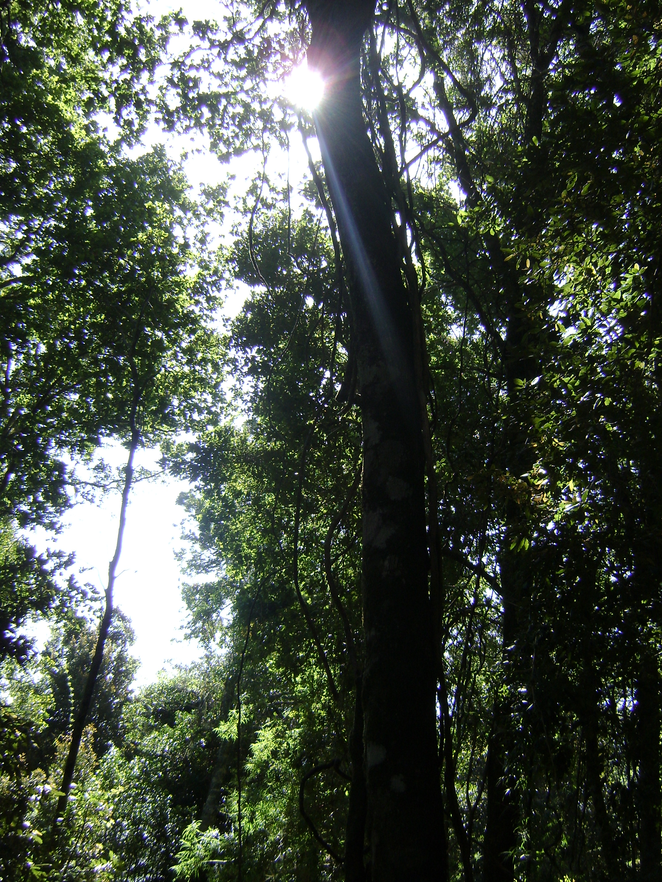 Bosque nativo del parque Jorge Alessandri